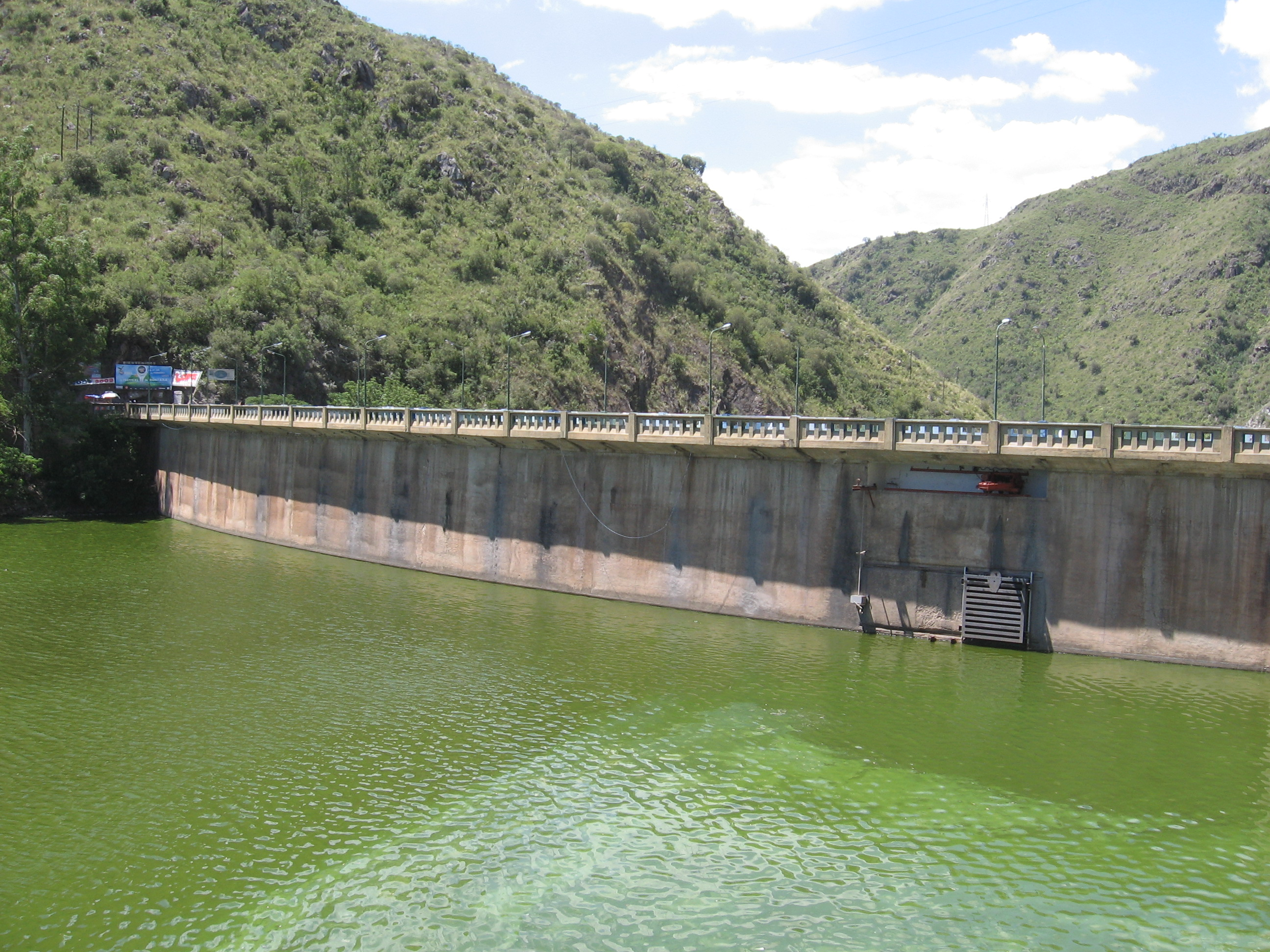 Dique San Roque, en la provincia de Córdoba